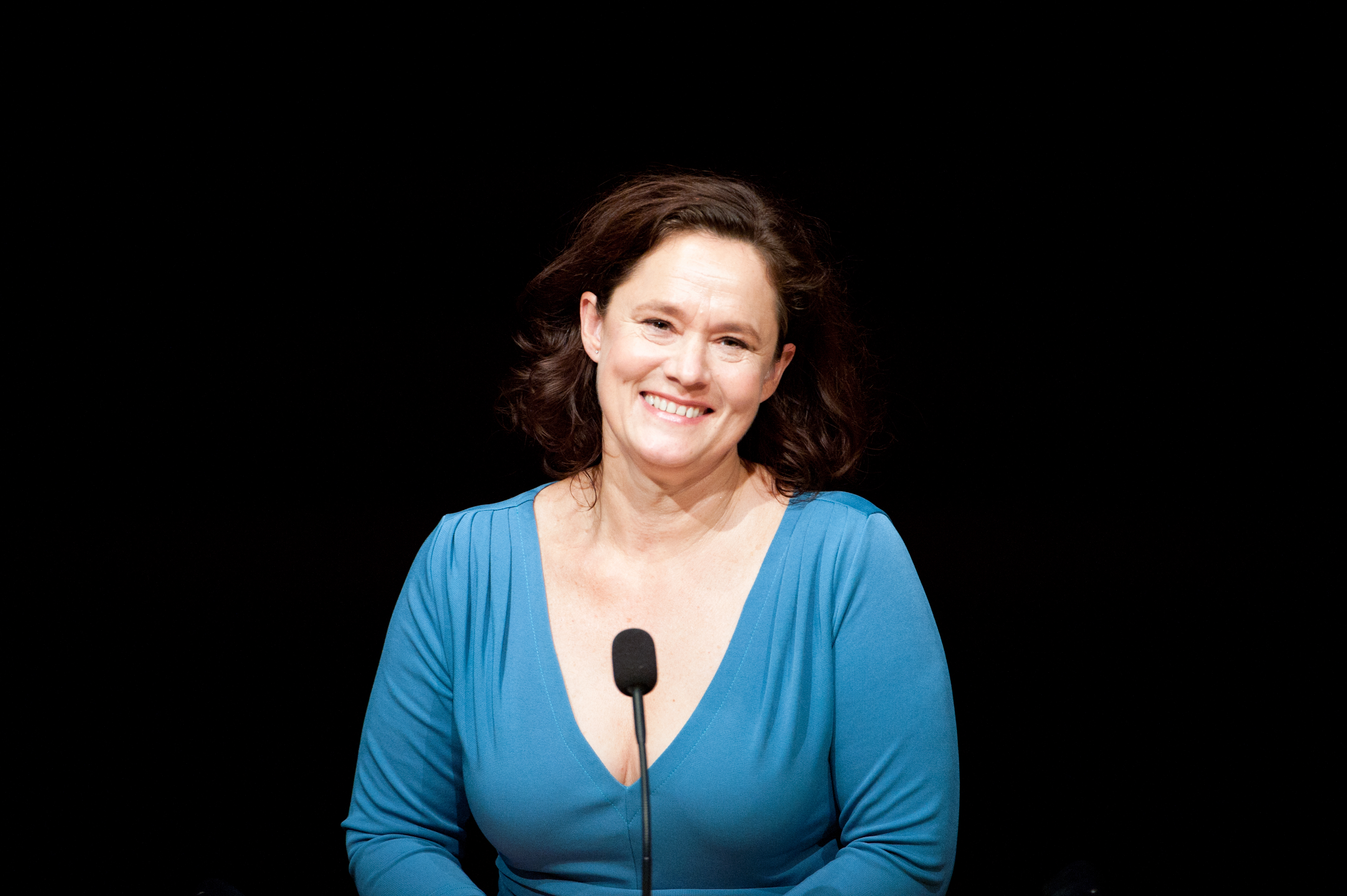 Pernilla August, vinnare av Nordiska rådets filmpris 2011